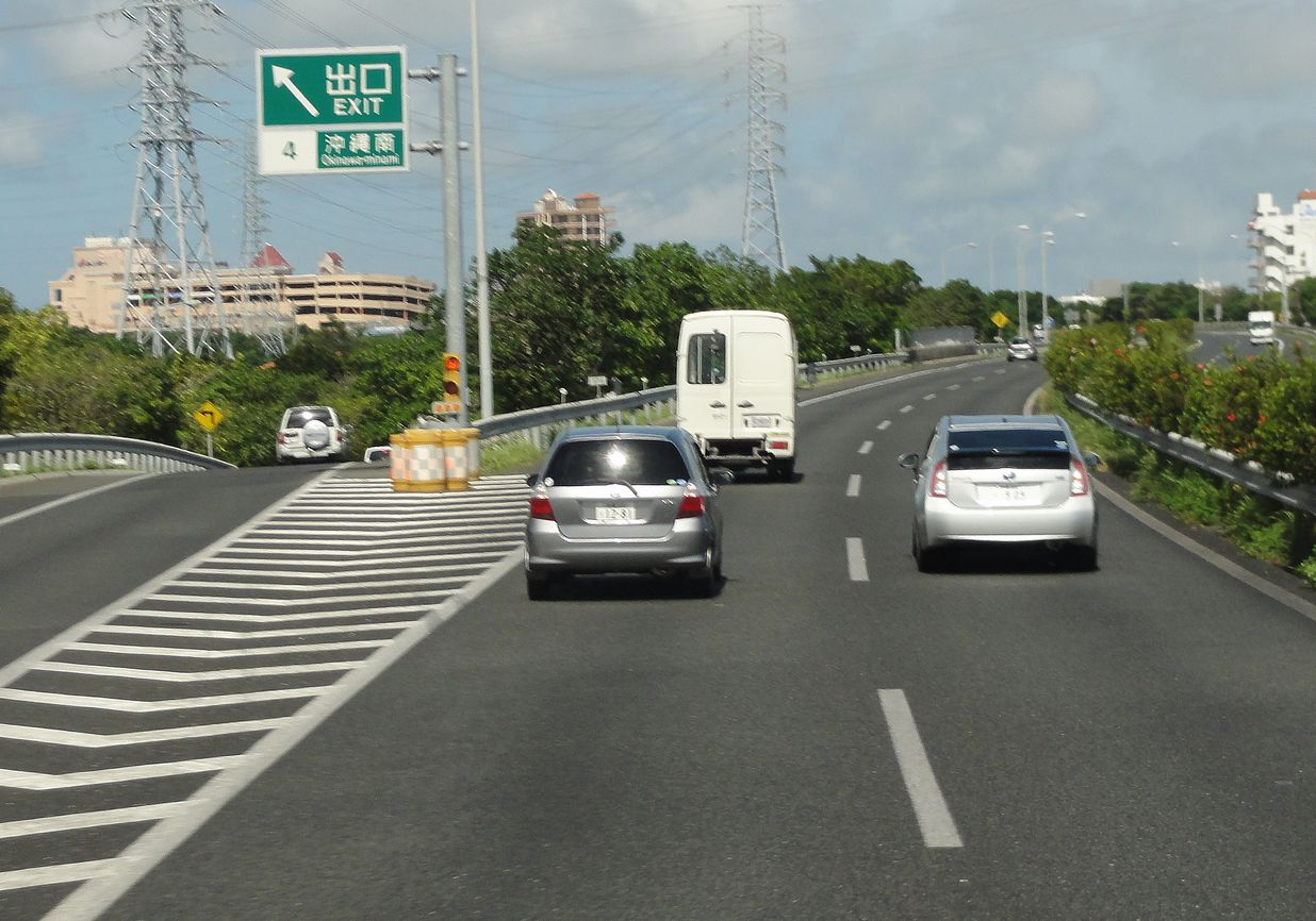 沖縄南インターチェンジ